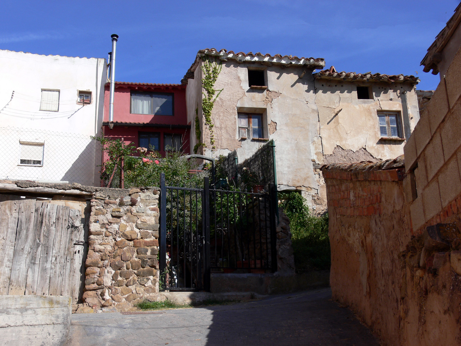 Bergasillas Bajera, La Rioja - España.